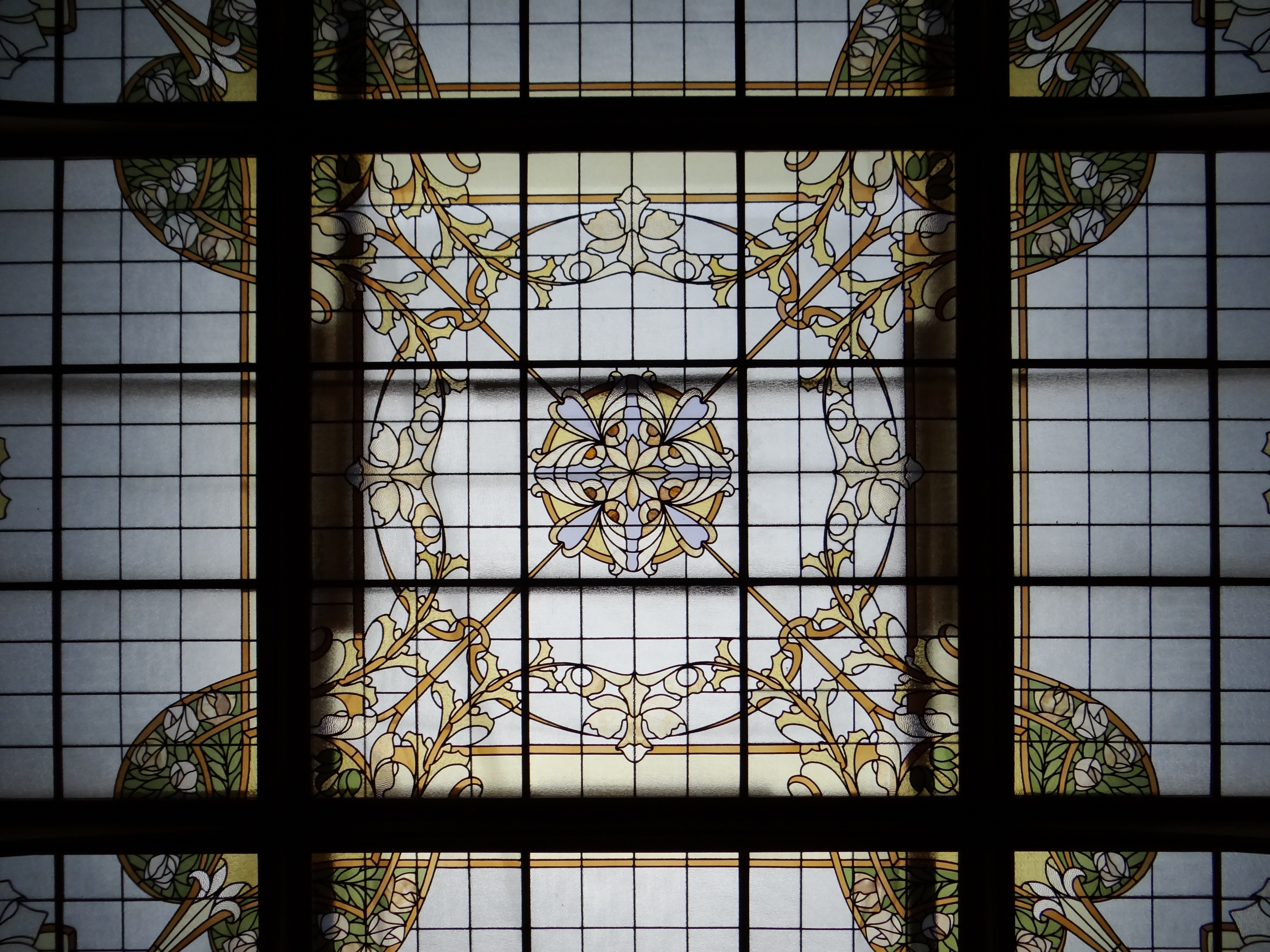 Verrière de la maison Losseau, surplombant le salon. Verre et poutres de bois, stylisation de rosiers-tiges et d'orchidées. 1905.